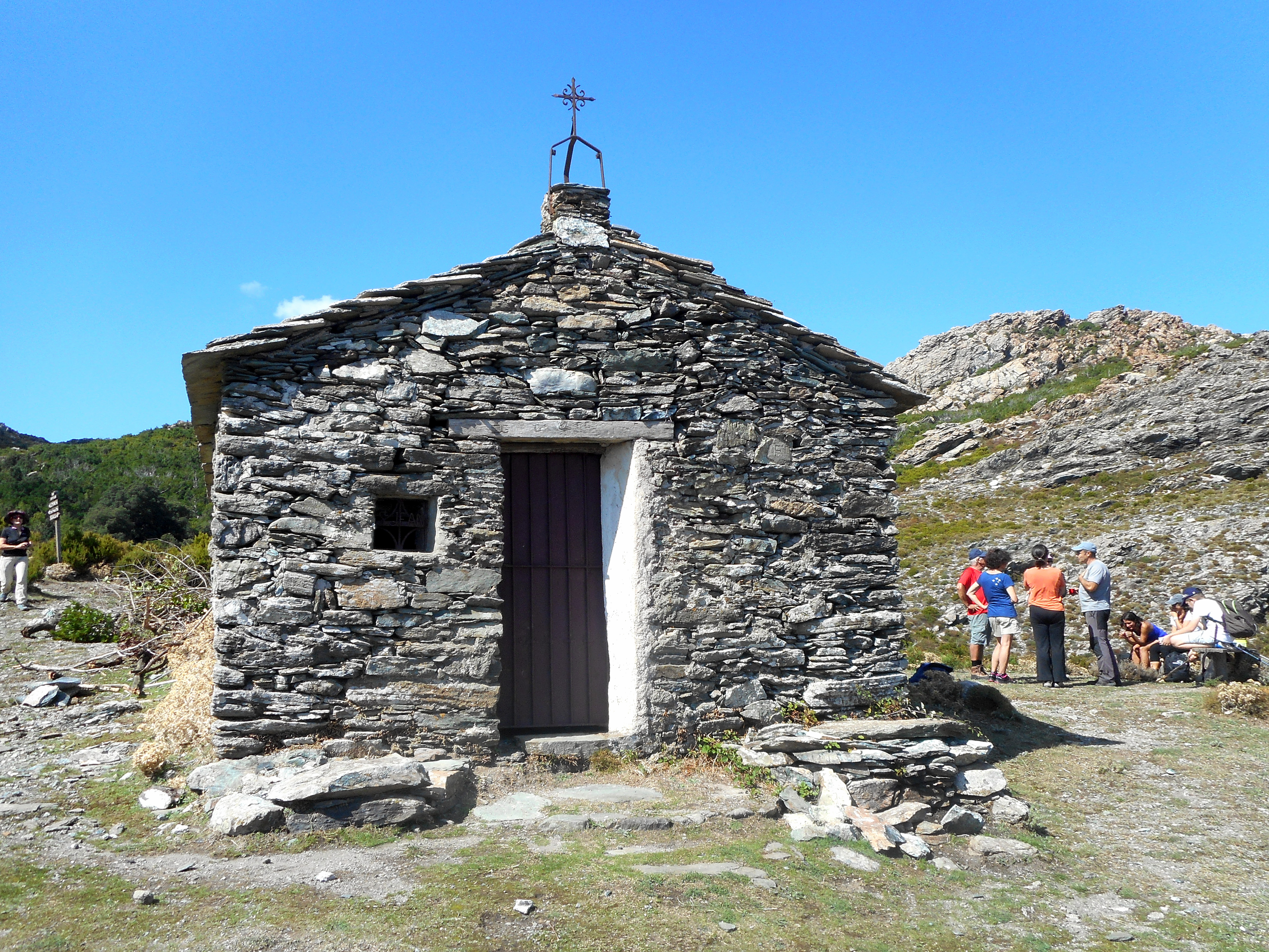 Santa-Maria-di-Lota, Cap Corse (Haute-Corse) - Chapelle Saint-Jean (790 m d'altitude) à 1,5 km au N-NW du hameau de Mandriale